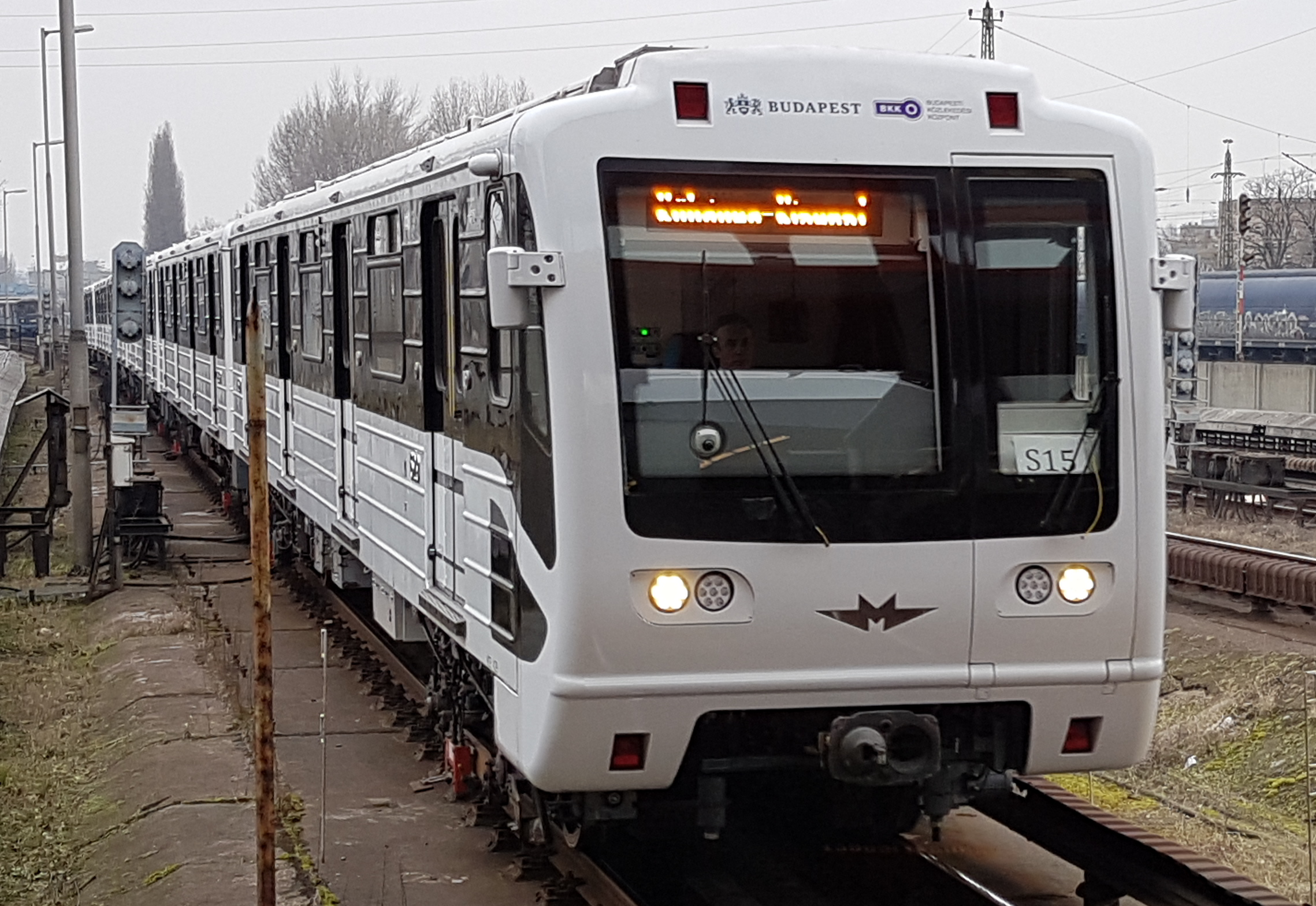 Rame rénovée de type 81-717-714 au terminus du métro 3 de Budapest, Kőbánya-Kispest.